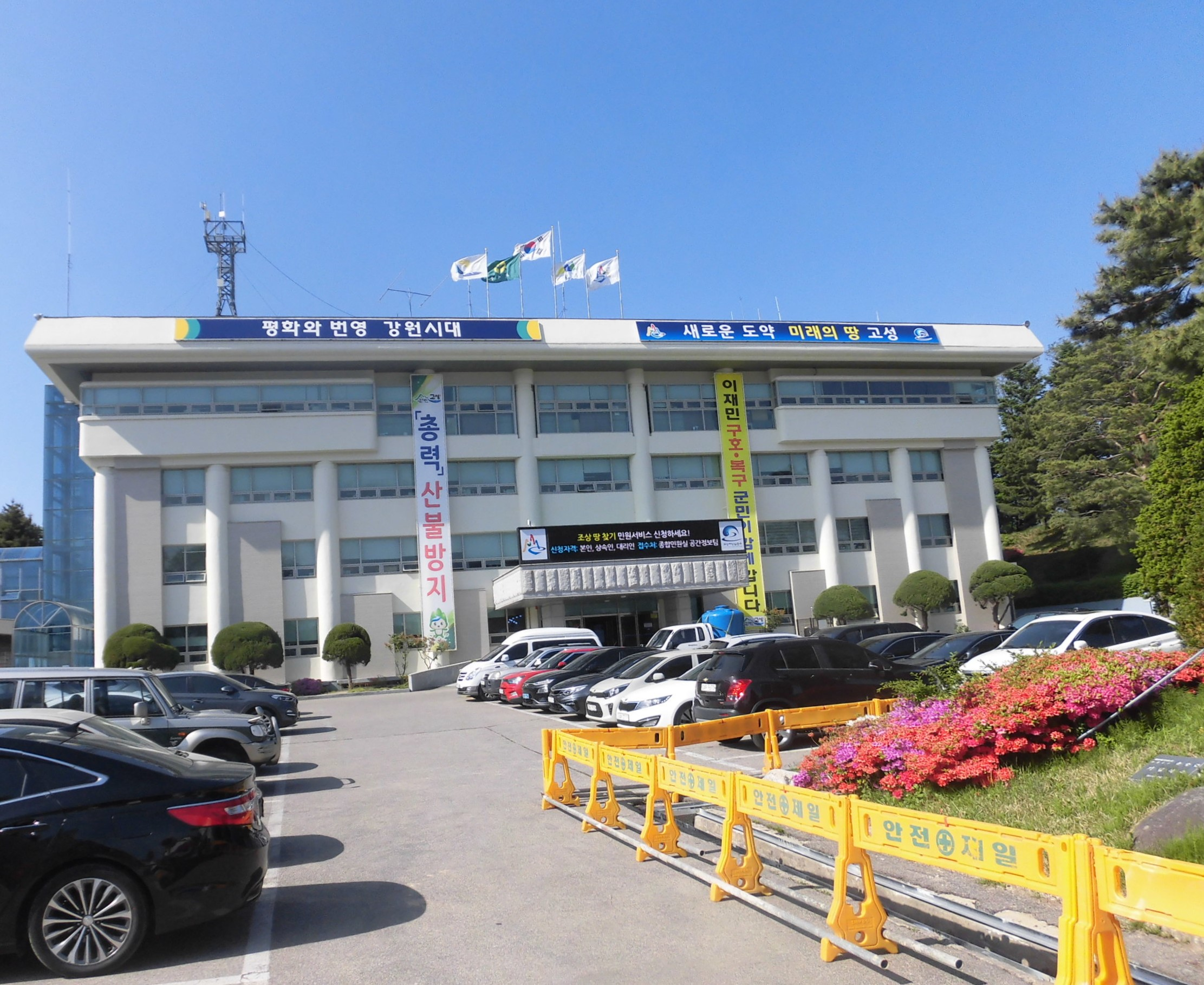 강원도 고성군에 있는 고성군청